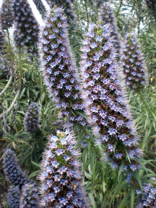 Echium fastuosum